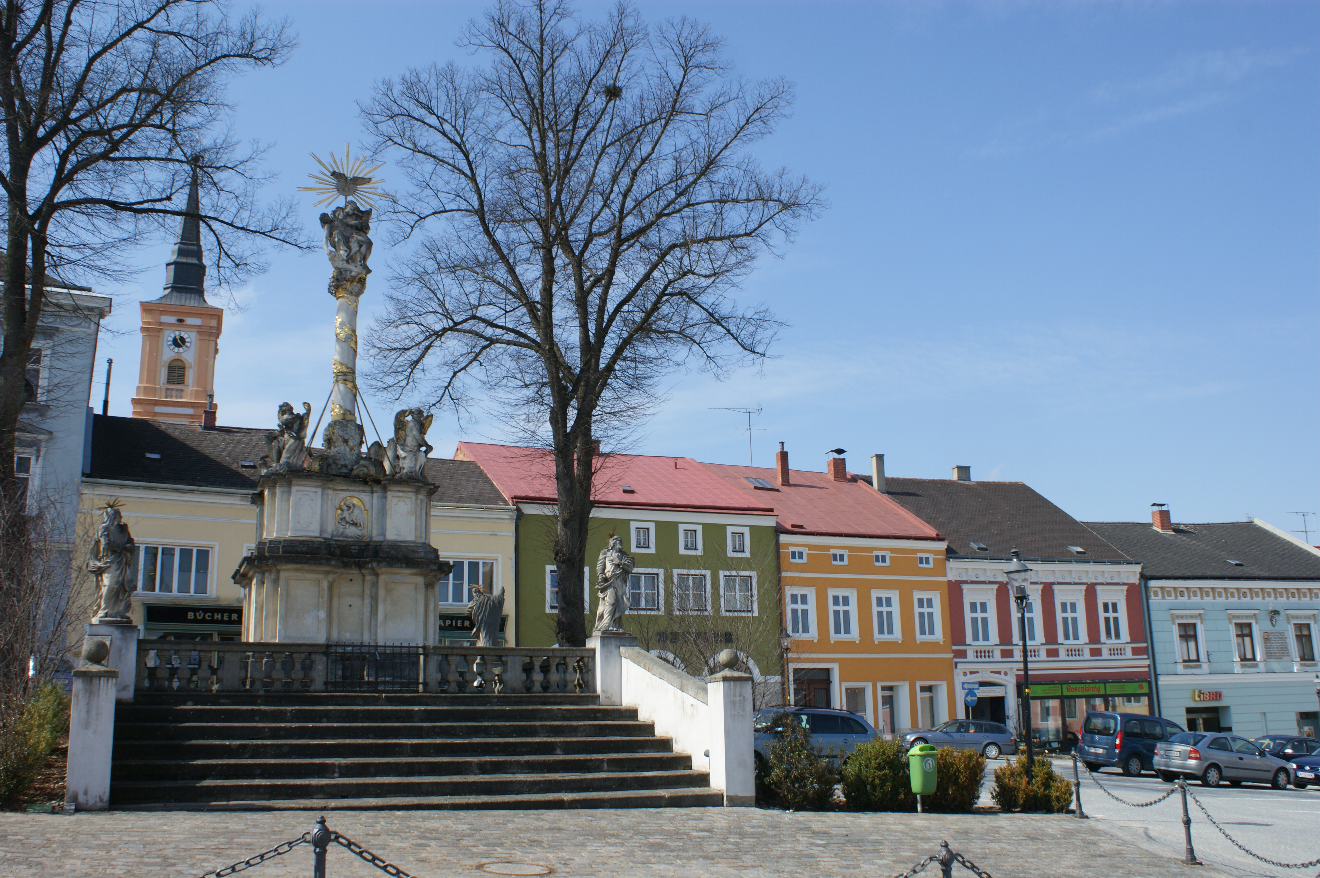 Hauptplatz von Waidhofen/Thaya mit der denkmalgeschützten Pest/Dreifaltigkeitssäule This media shows the natural monument in Lower Austria with the ID WT-038.